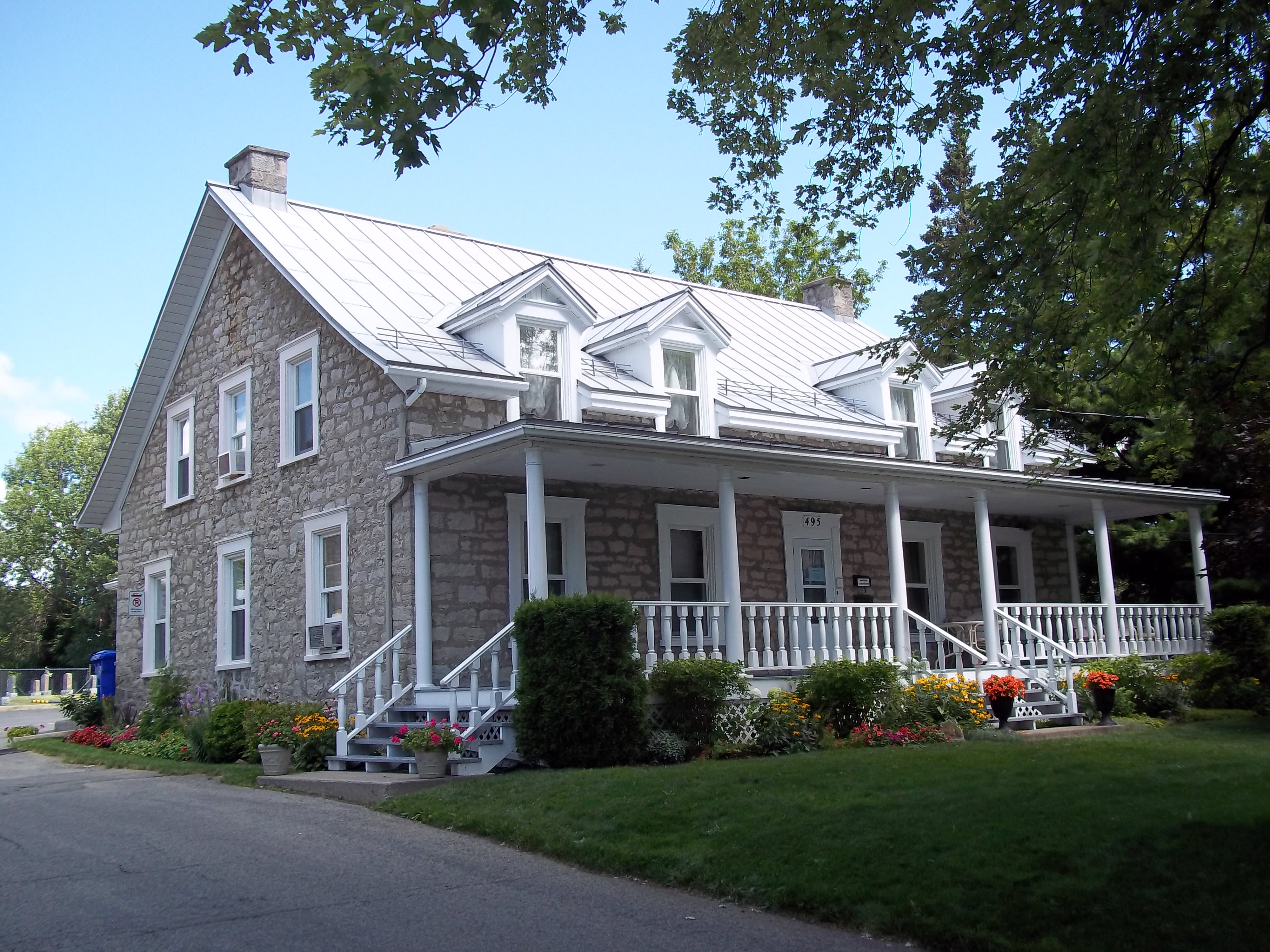 Presbytère de l'église Saint-Raphael-Archange, 495, rue Cherrier, île Bizard.